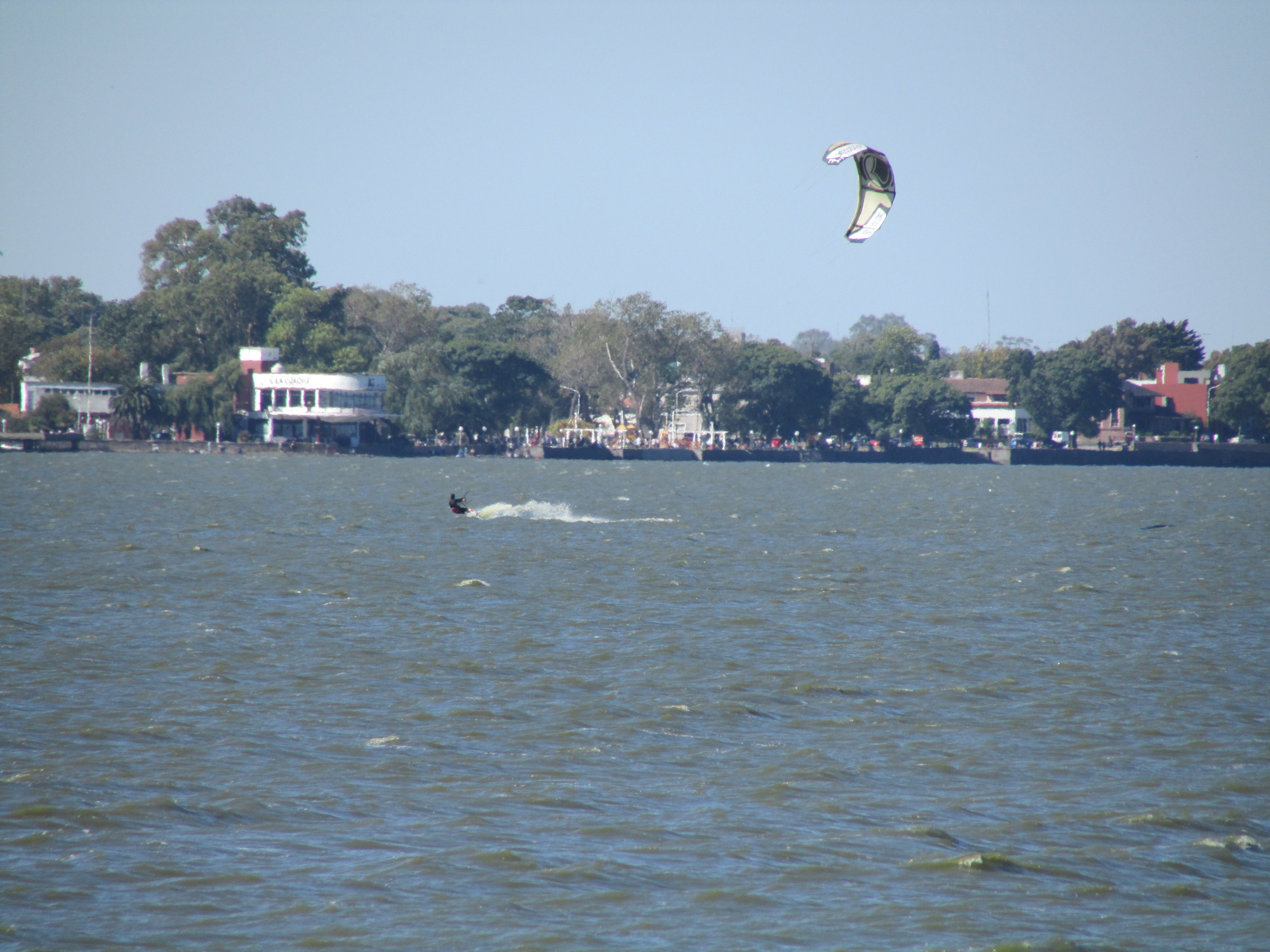 Laguna de Chascomús en la ciudad homónima en la provincia de Buenos Aires, Argentina.